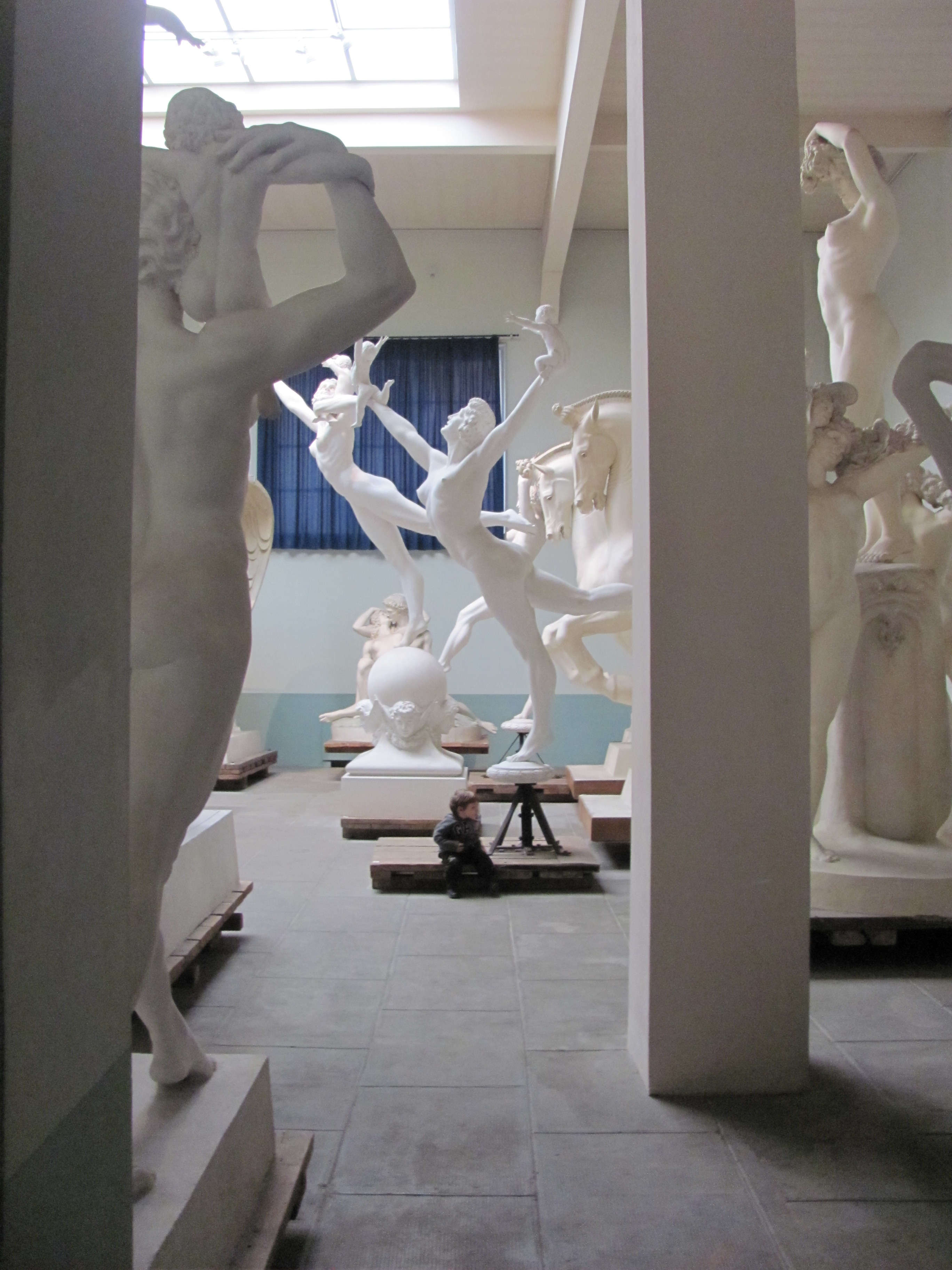 Museo Hendrik C. Andersen - MIBAC This is a photo of a monument which is part of cultural heritage of Italy.